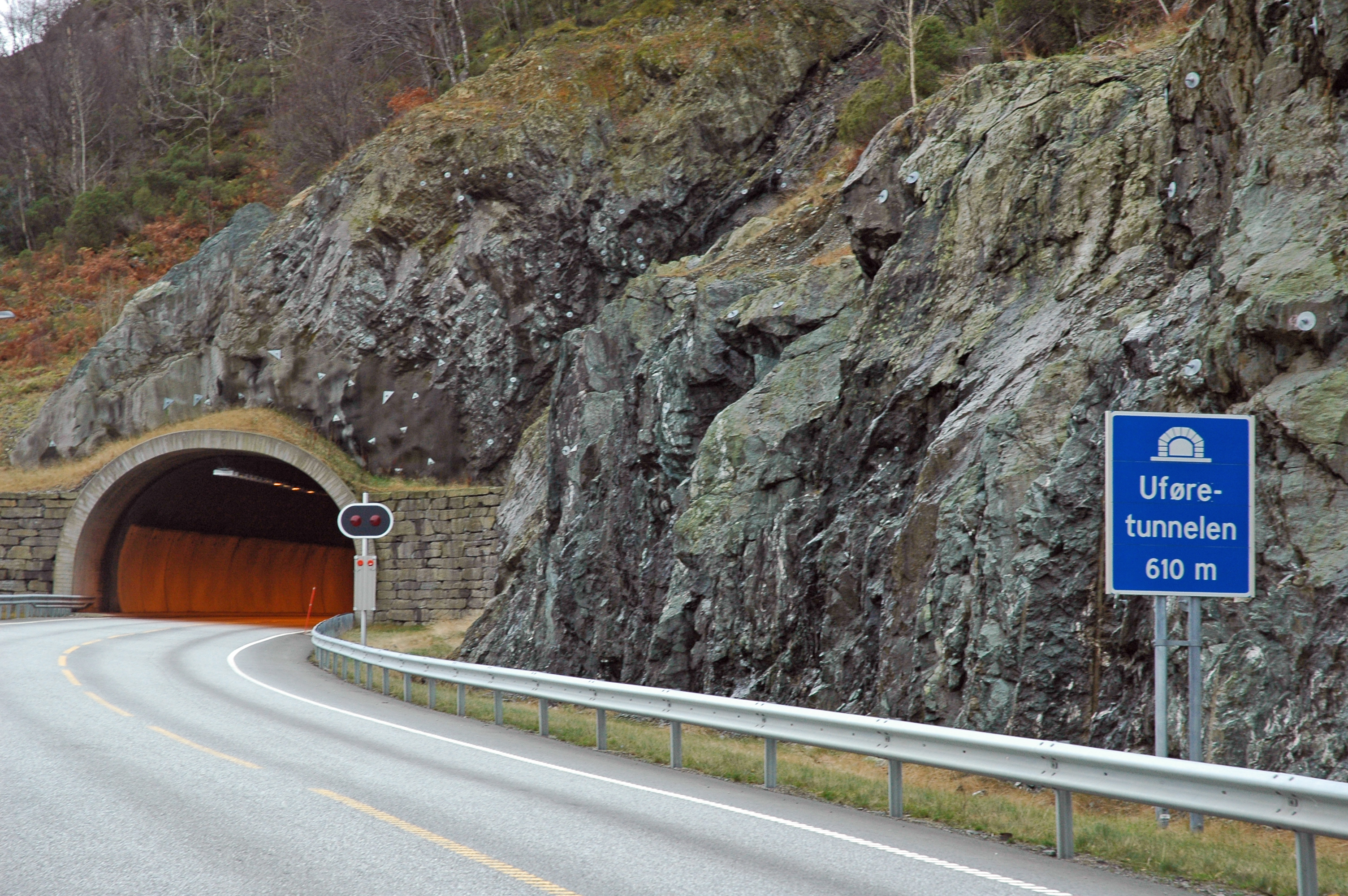 Uføretunnelen, E39 Stord